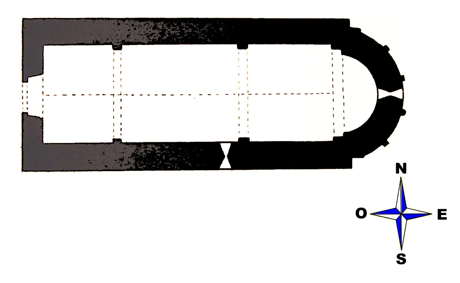 Plànol de l'església de la Santa Creu d'Ollers, a Guixers (Solsonès. El plànol ha estat extret del llibre Esglésies romàniques del Solsonès.